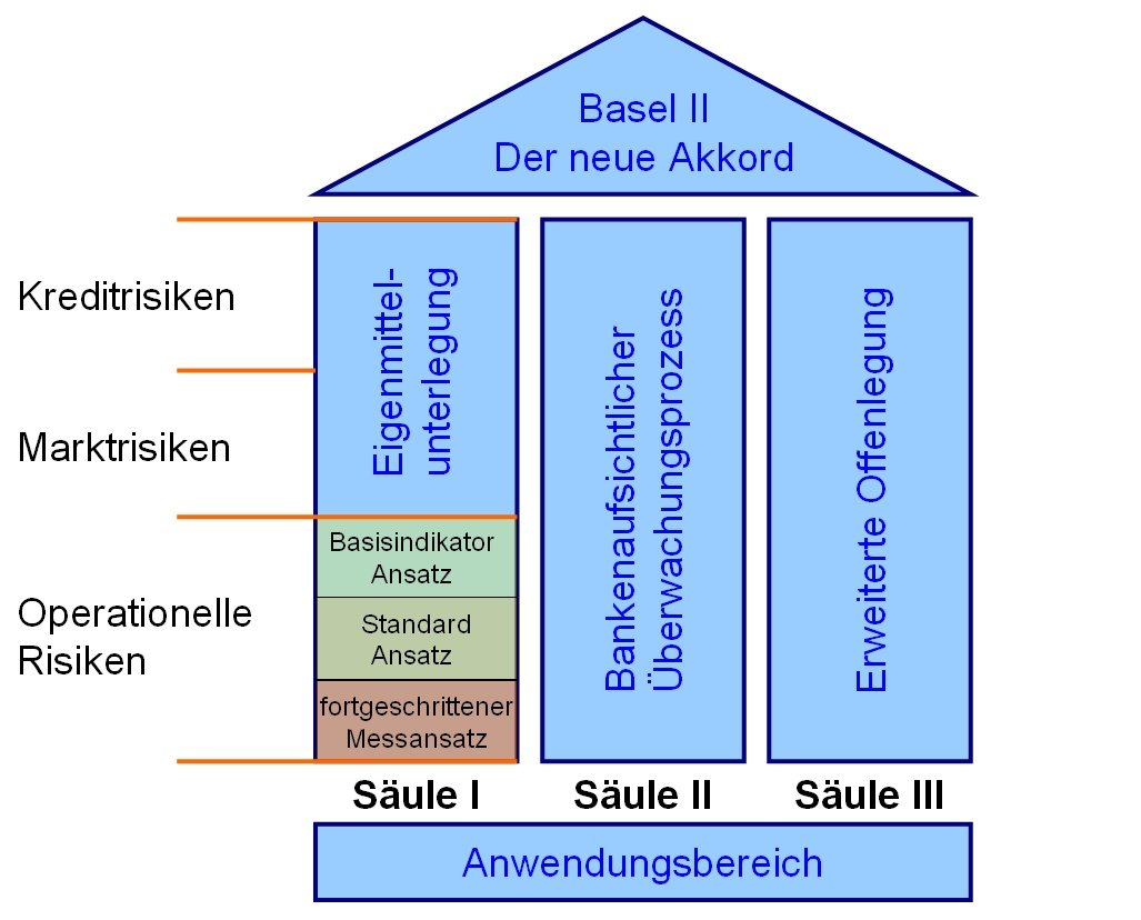 Übersicht FH-Fulda, zu Basel II, über die Gesamtheit der Eigenkapitalvorschriften von Kreditinstituten. Einordnung des Advanced Measurement Approach (AMA)